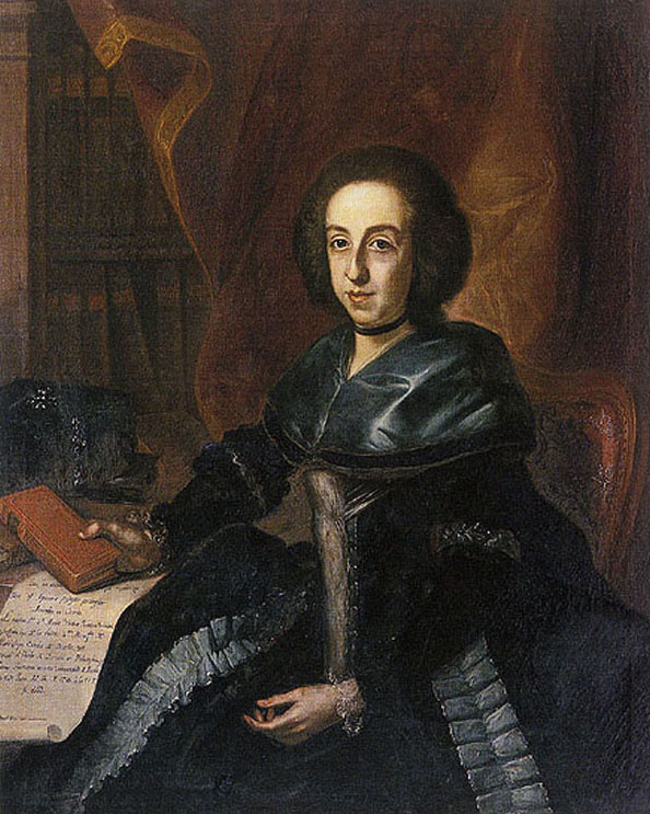 Retrato de la aristócrata española María Isidra de Guzmán y de la Cerda (1768-1803), la primera mujer que ostentó en España el título de doctor y la dignidad de académica de la Real Academia Española.